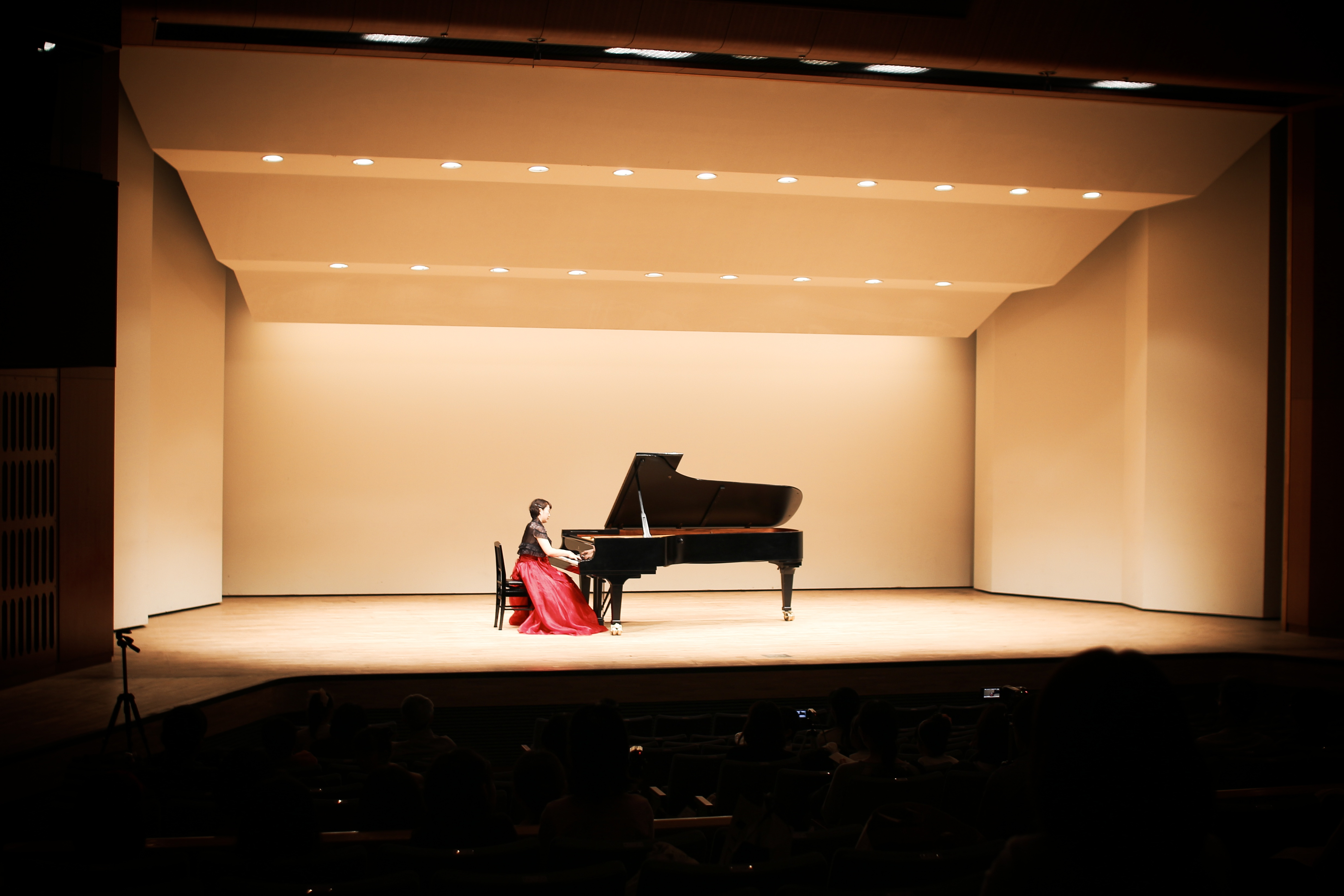 講師演奏はラフマニノフの「アンダンテカンタービレ」。 ・・・どこかで聴いたことのある曲だと思ったら、1989年にビクターがビデオデッキのCMで使っていた曲。我ながらよく覚えていたな（苦笑）。 「S席」シリーズのCMは新モデルが発表されても暫く続いていたのでとても印象に残っておりました。